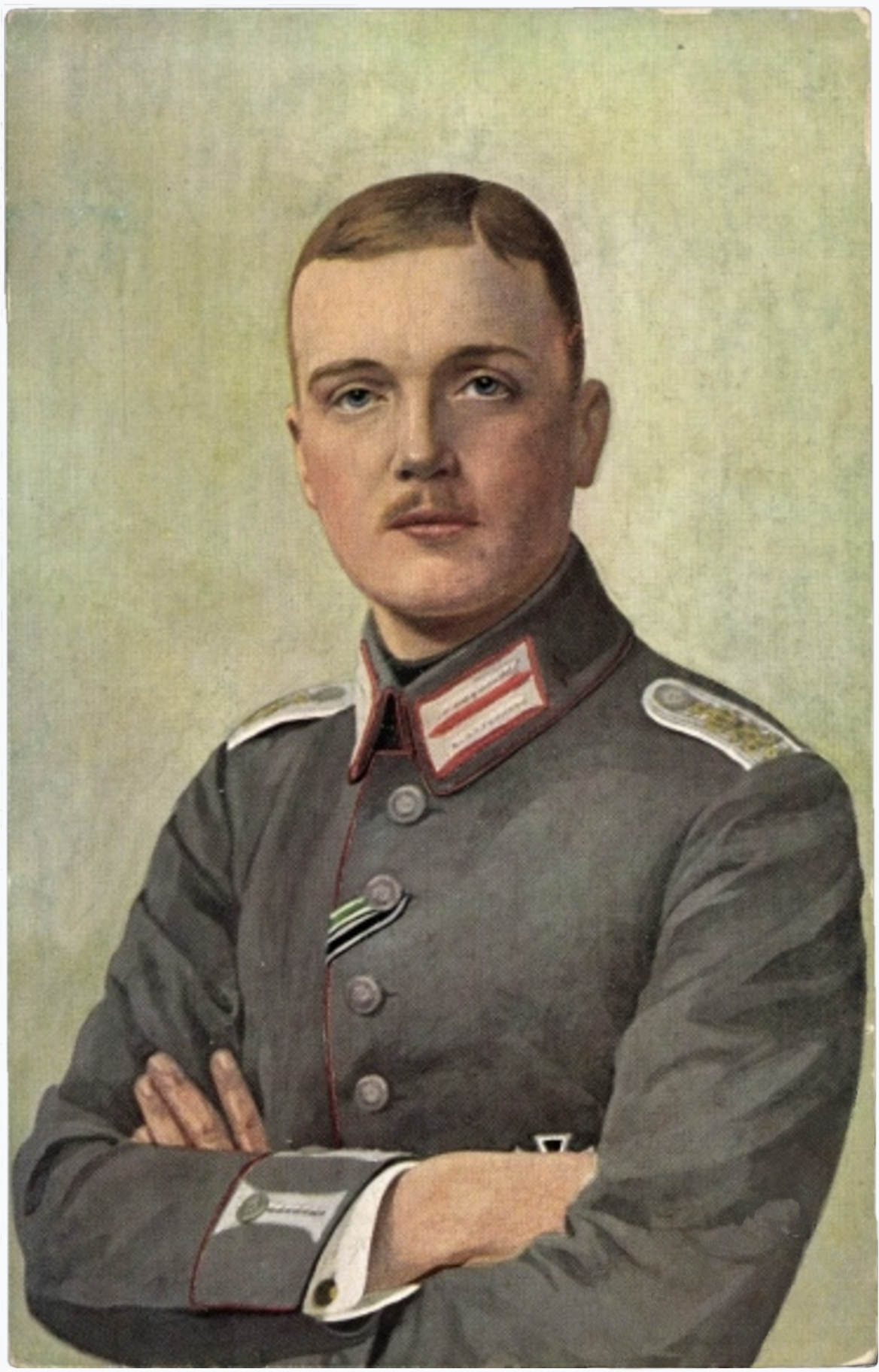 Kronprinz Georg von Sachsen um 1916